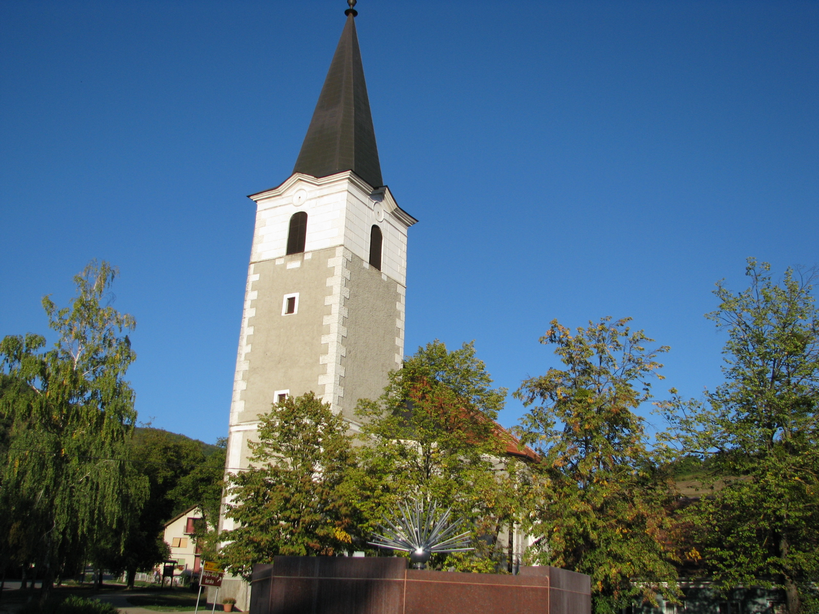 Lobor